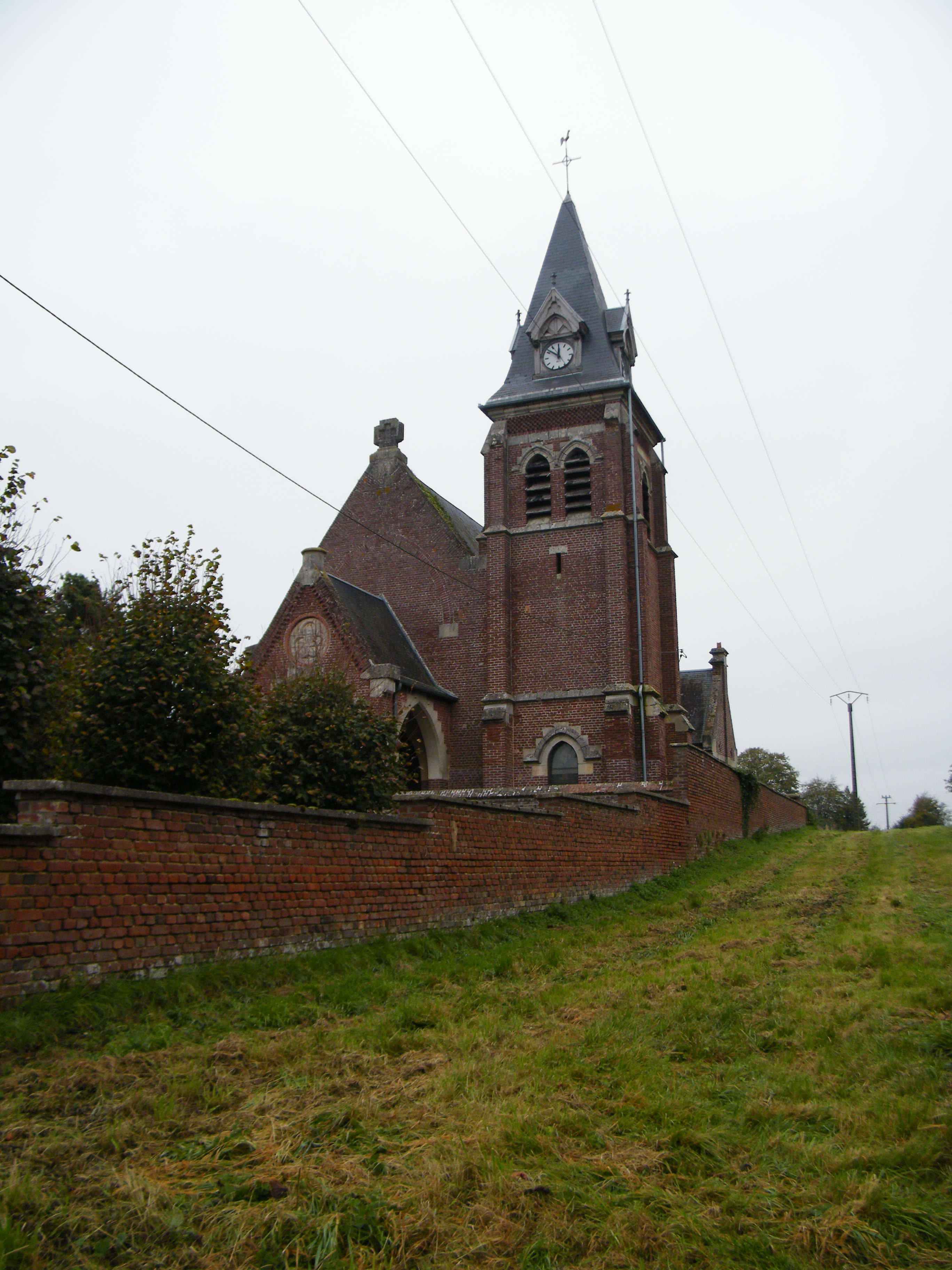 L'église de Fouquescourt, Somme, France.